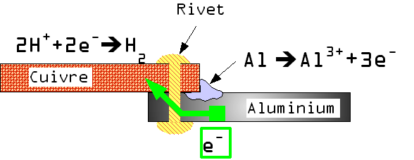 Corrosion galvanique, exemple d'un assemblage par rivet entre une tôle d'aluminium et de cuivre sans isolation.